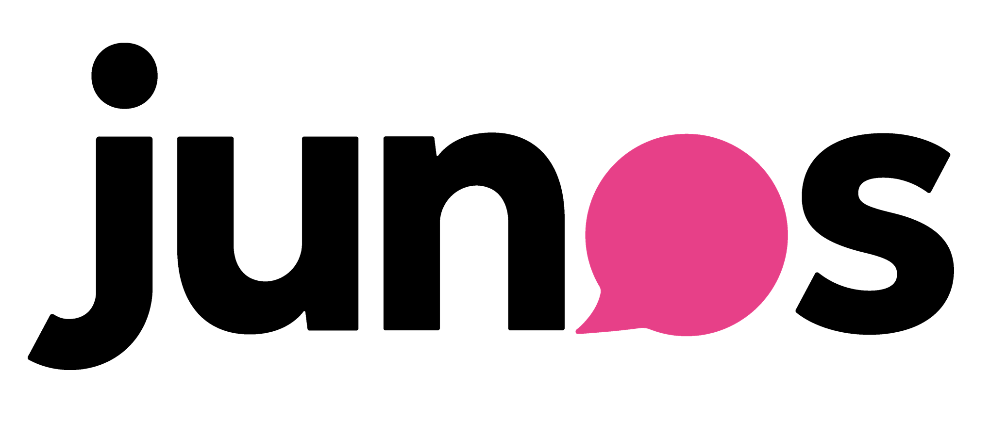 Das Logo der JUNOS - Junge Liberale NEOS